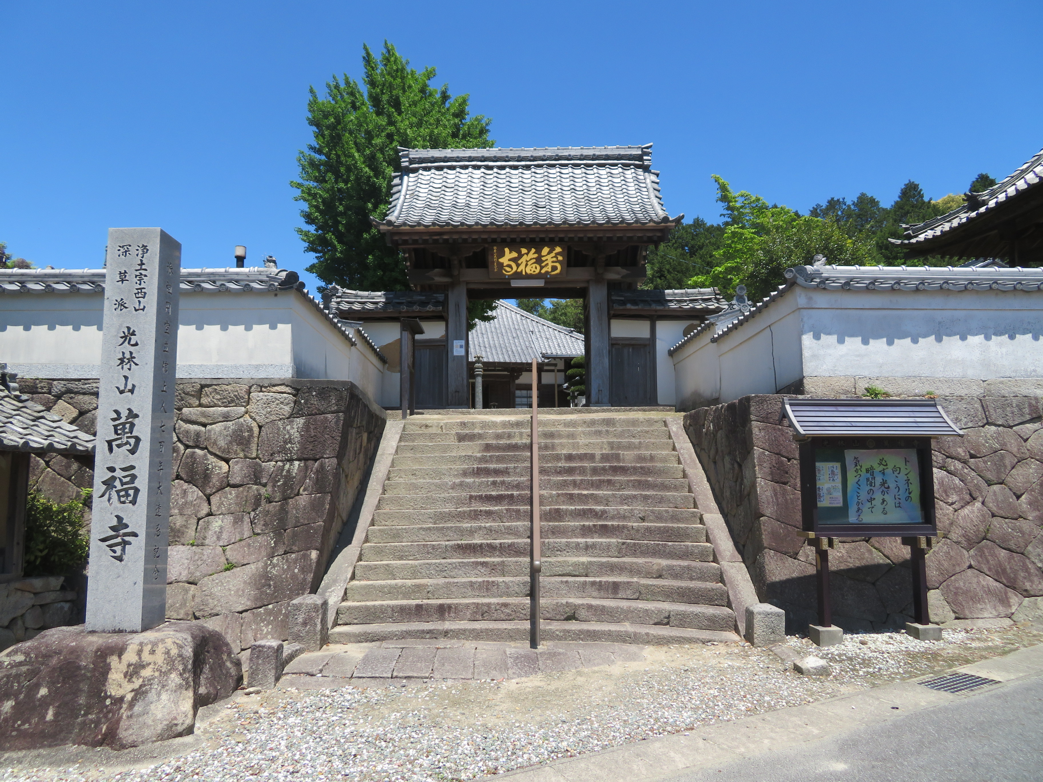 萬福寺（岡崎市田口町）